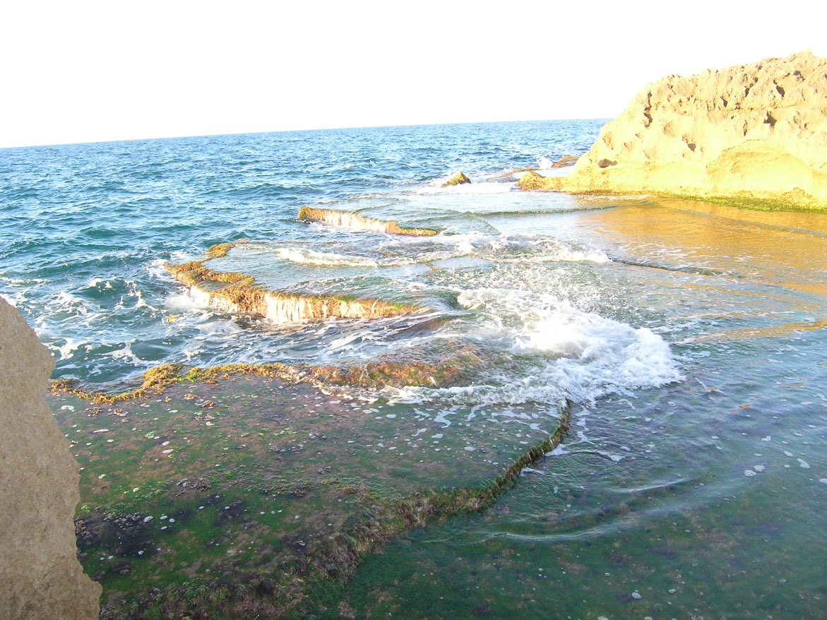 Crique a stidia Mostaganem Algeria